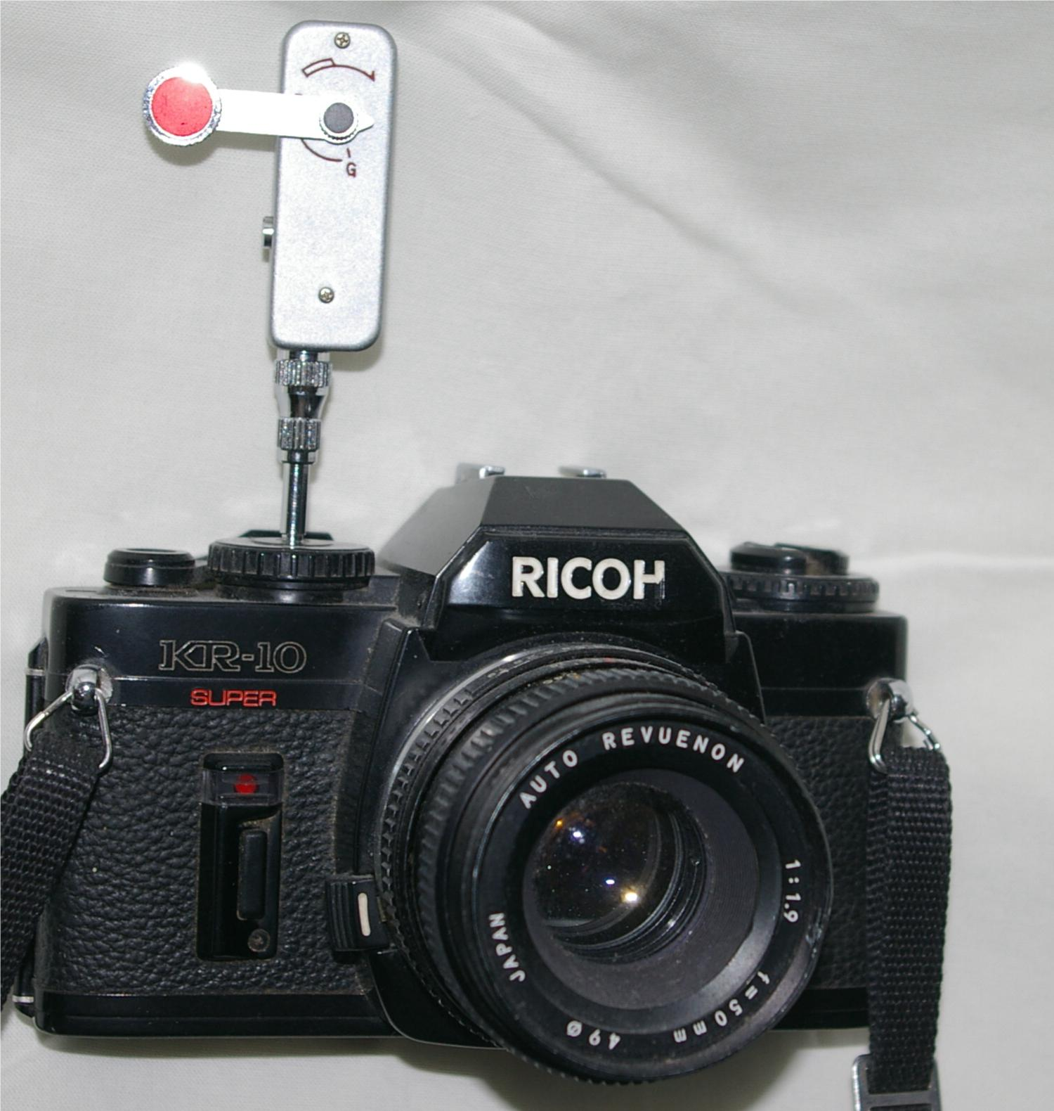 Kamera mit montiertem mechanischen Selbstauslöser (nur zu Demonstrationszwecken, da die Kamera einen elektronischen eingebauten Selbstauslöser hat).